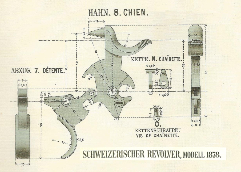 Revolver 1878 Hahn